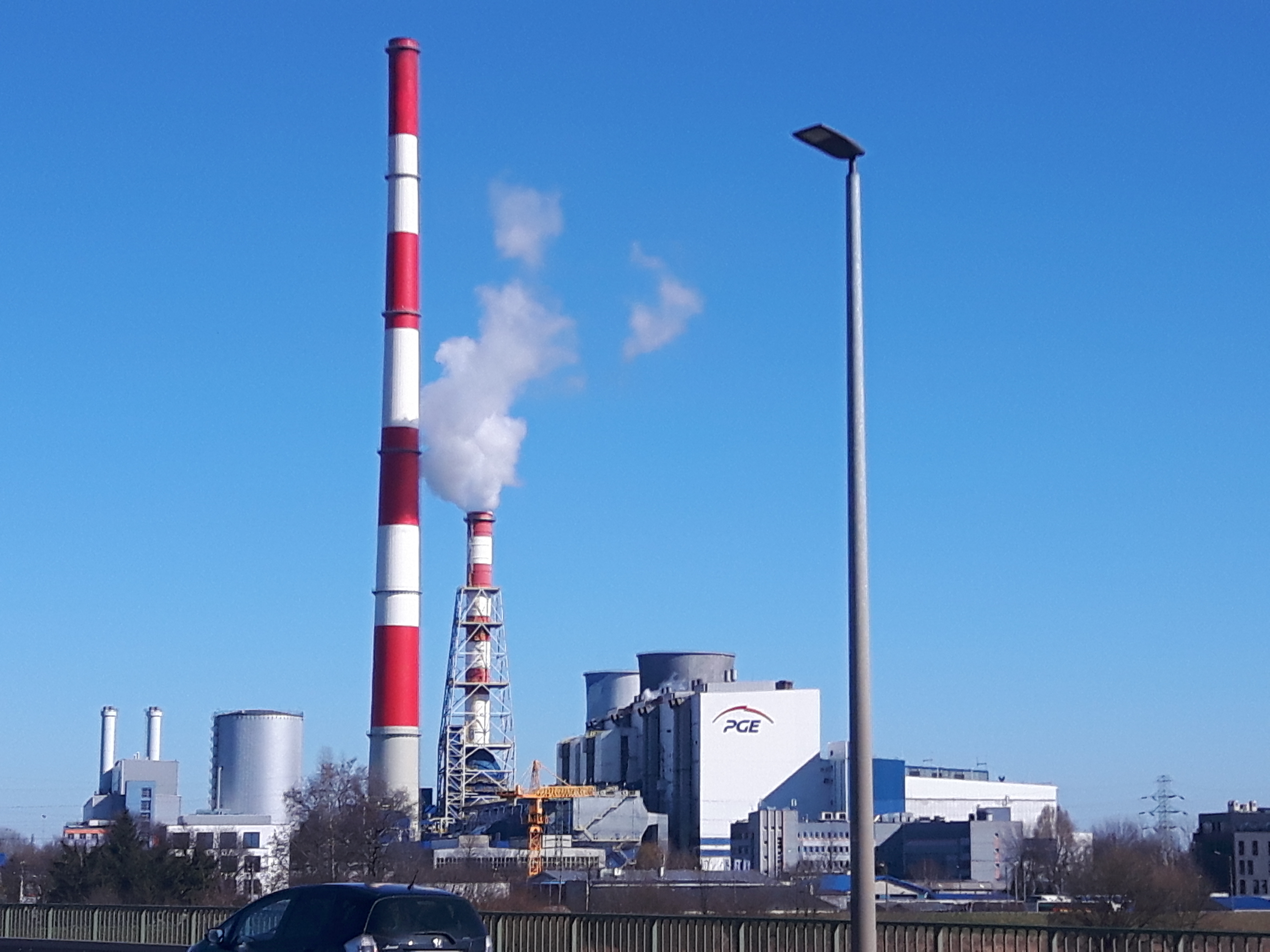 Elektrociepłownia Łęg, Kraków